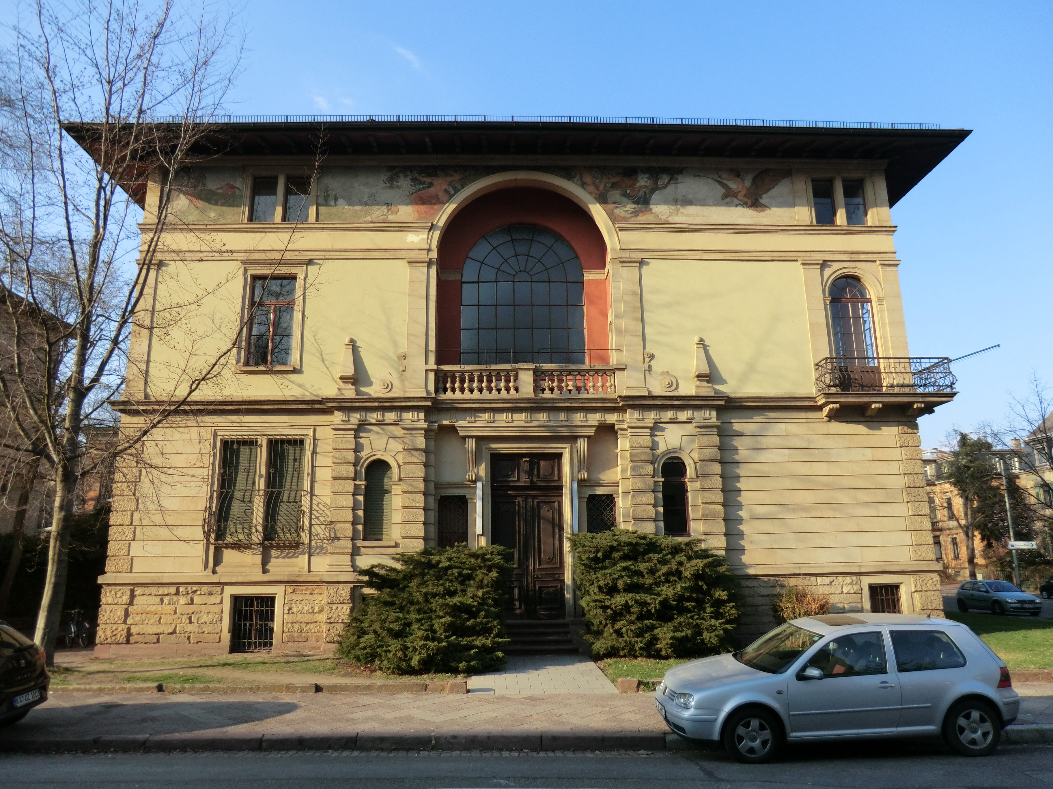 Haus Schönleber, Hochschule für Musik, Jahnstr. 18, Karlsruhe